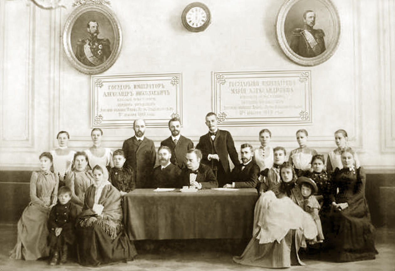 Руководящий состав больницы принца Петра Ольденбургского. Сидят: А. А. Руссов, К. А. Раухфус, Ю. П. Серк. Стоят: Р. А. Петерс (в центре), В. Н. Рейтц (справа)